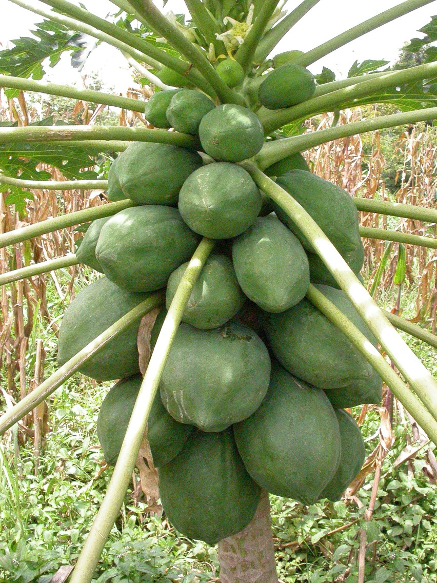 Fruiting papaya tree. Foto taken near Banfora, Burkina Faso.